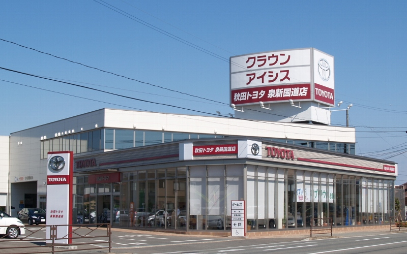 秋田トヨタ自動車泉新国道店（秋田市泉中央、秋田県道56号秋田天王線沿い）